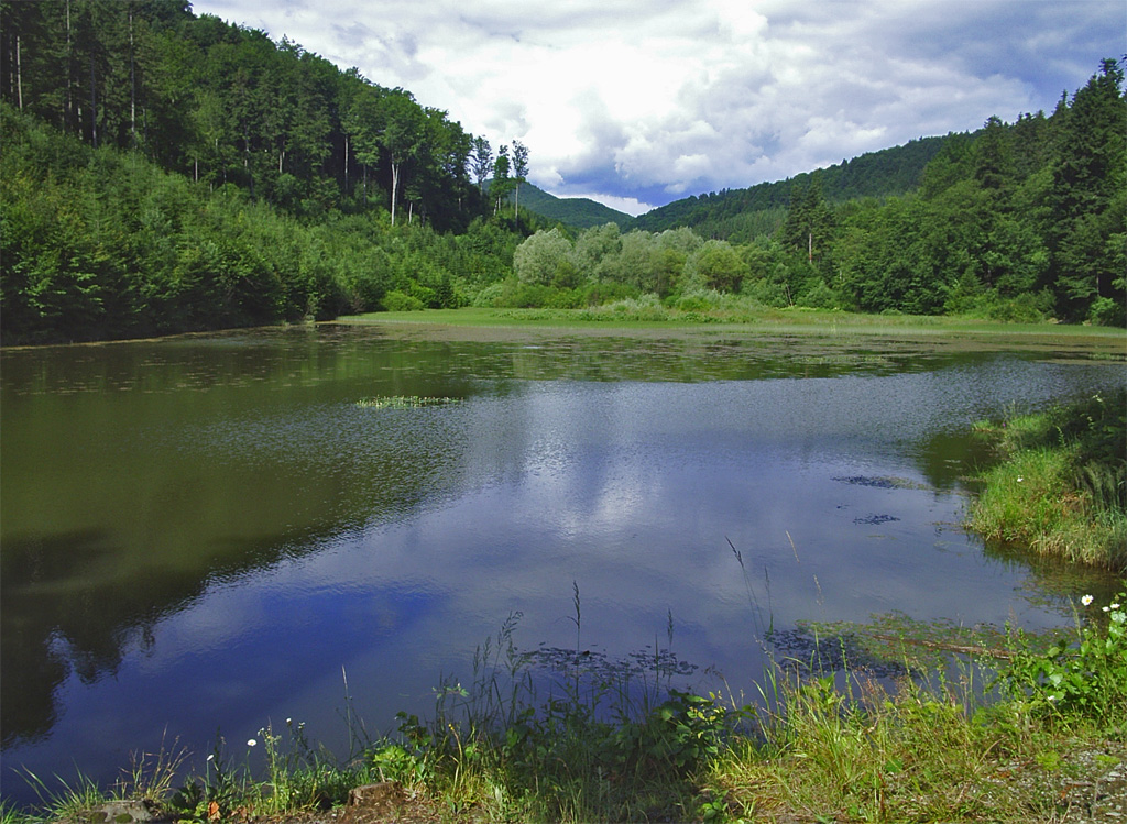 Krasnoilsk, Bukovina, Ukraine